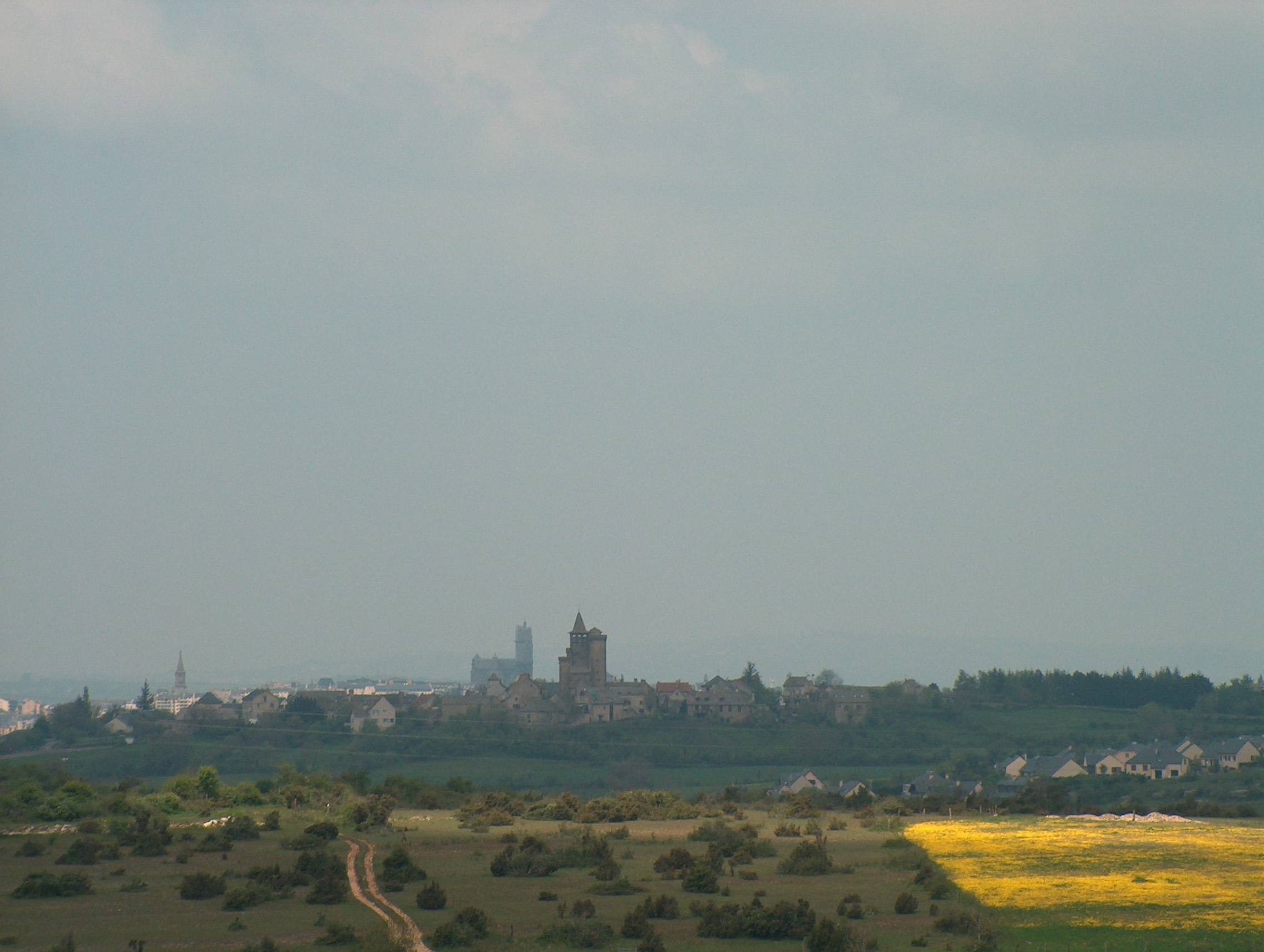 Vue de Sainte Radegonde avec en arrière plan la cathédrale de Rodez photo prise moi-même